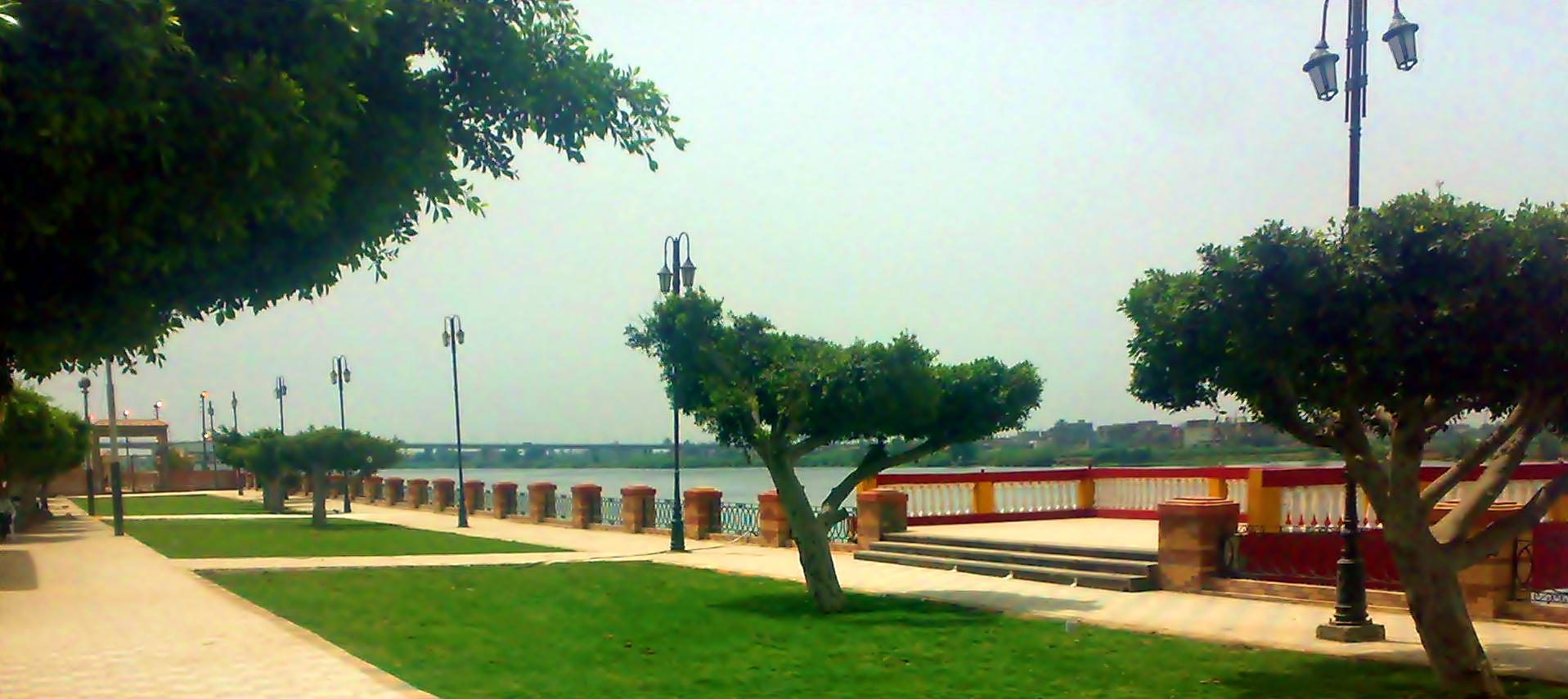 كورنيش النيل بدسوق